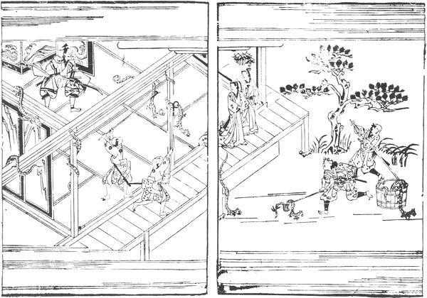 Shichifuja-no-yō (七歩蛇の妖) from Otogi Boko (伽婢子)